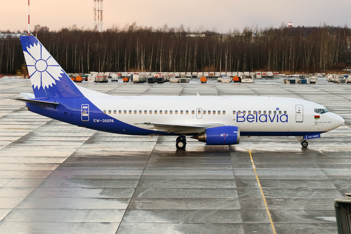 Belavia, EW-366PA, Boeing 737-31S